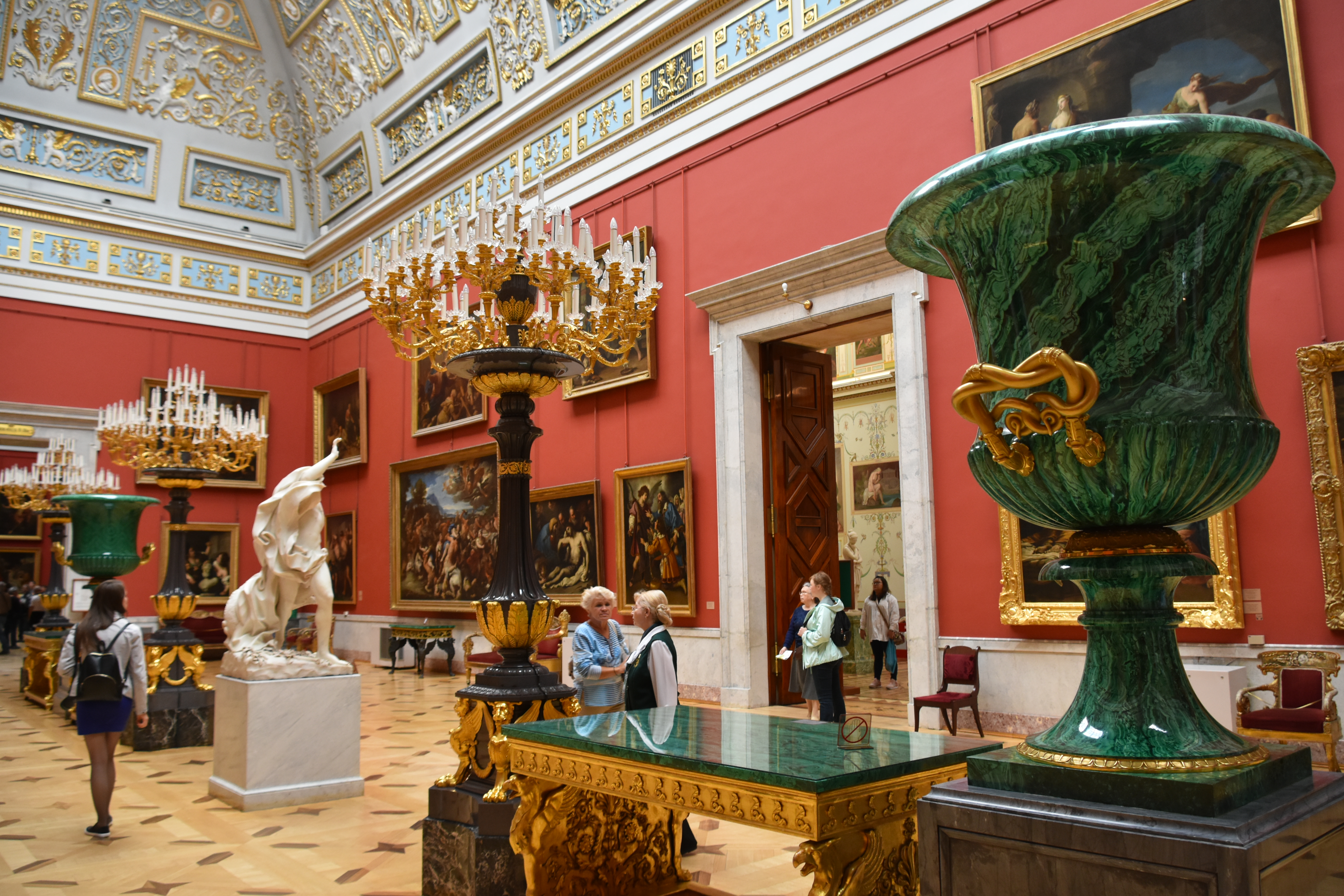 Hermitage Museum, St. Petersburg (38)